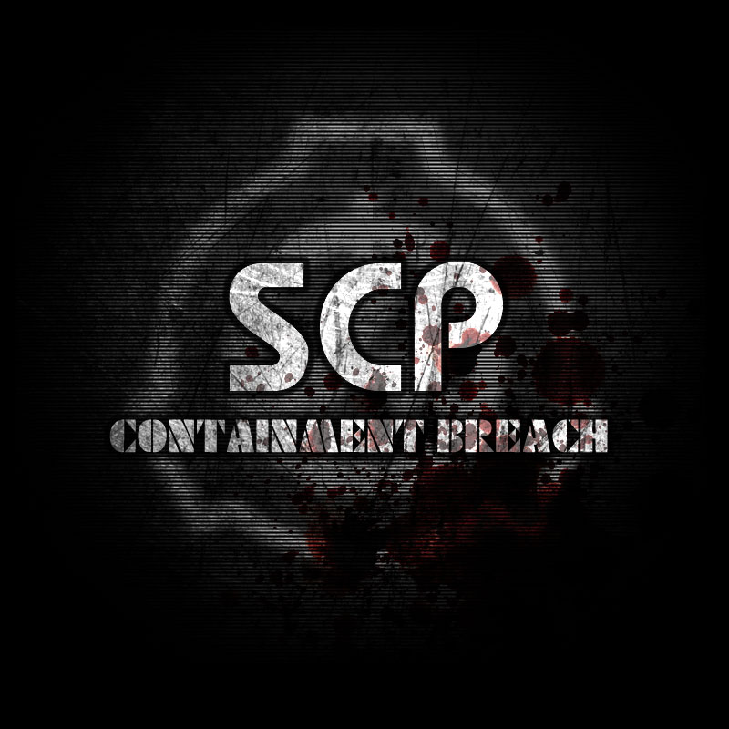 Logo hry SCP - Containment Breach.